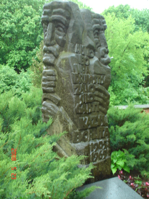 CMENTARZ NA ROSSIE.